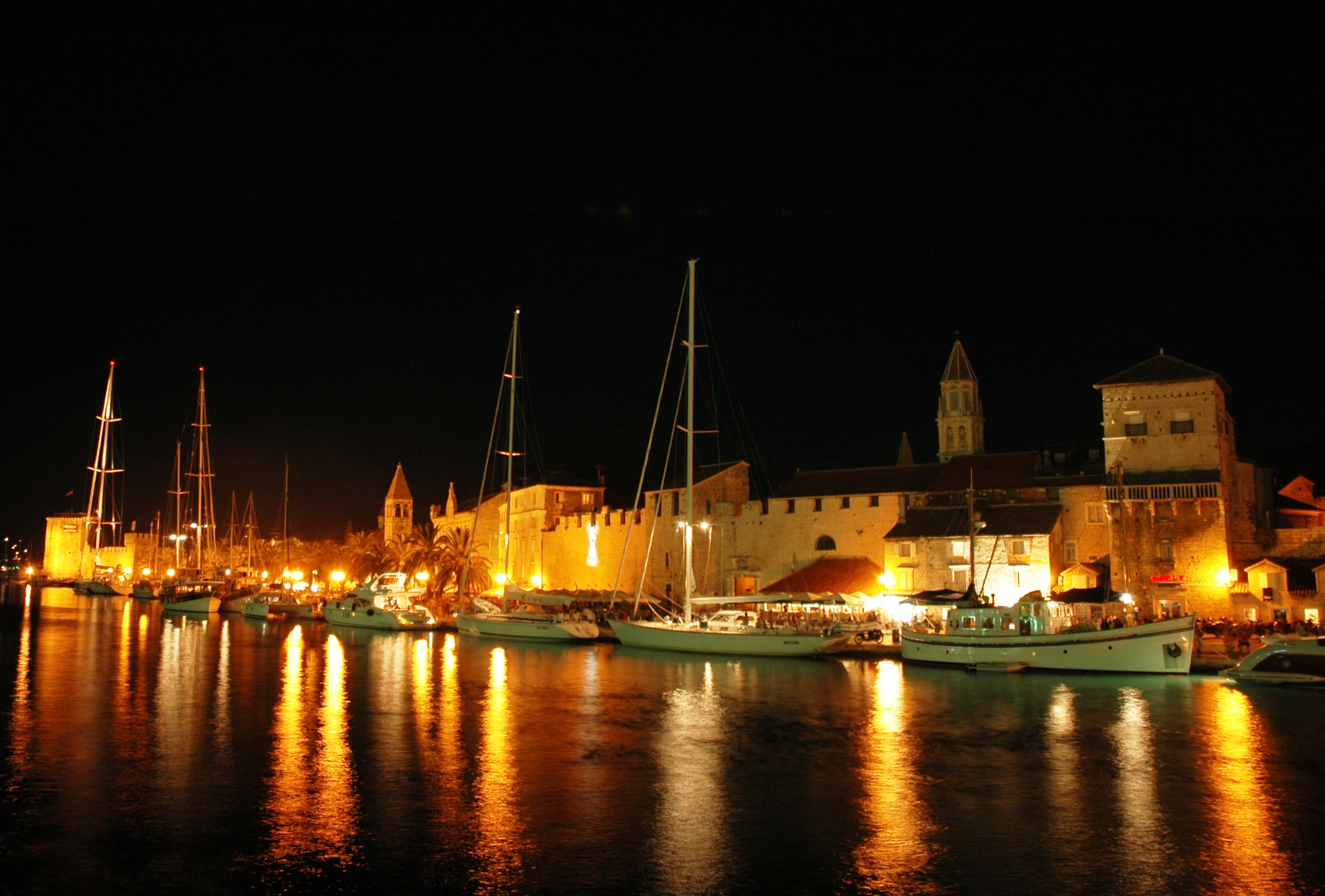 Trogir de nit